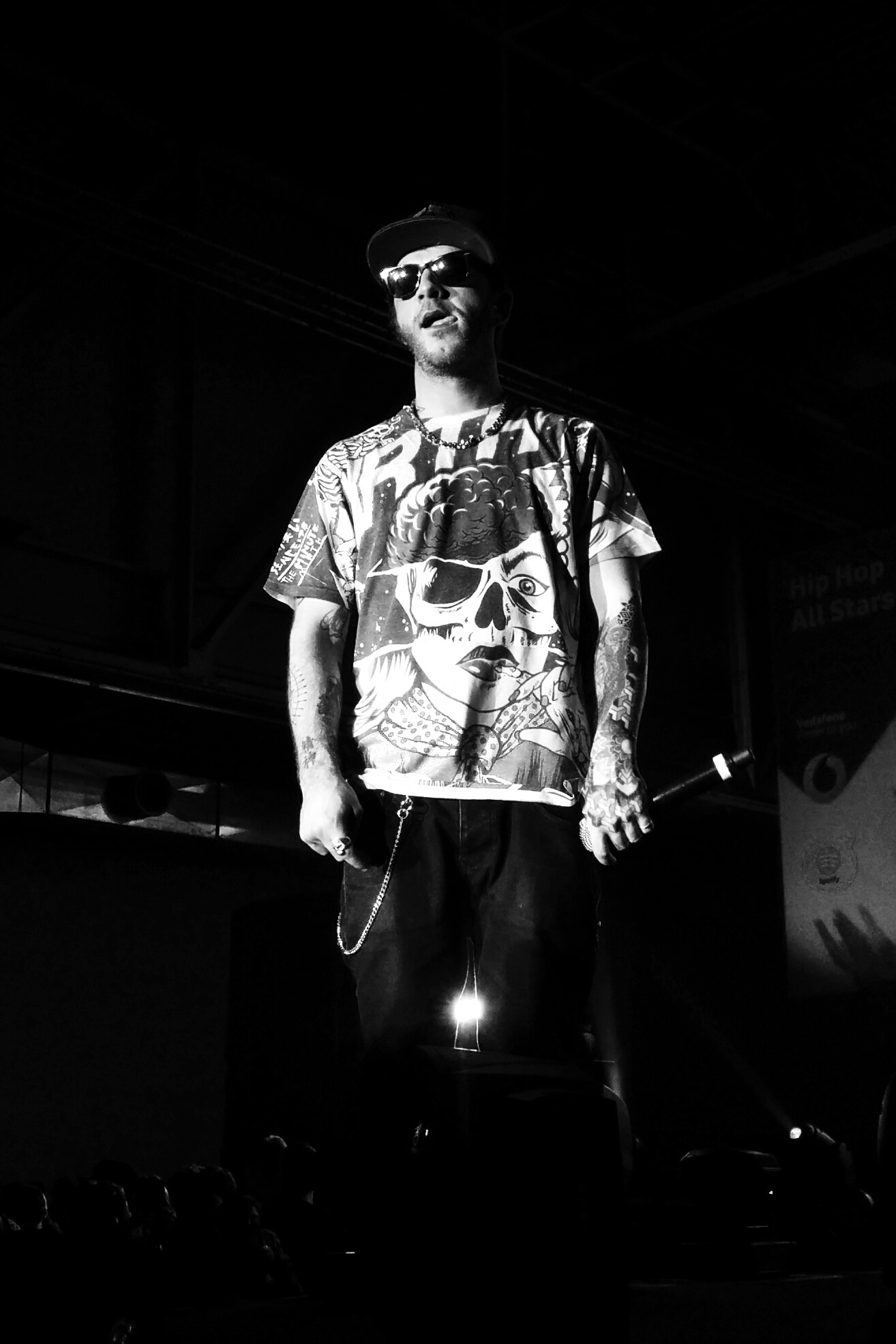 Il rapper Salmo a Milano nel 2014